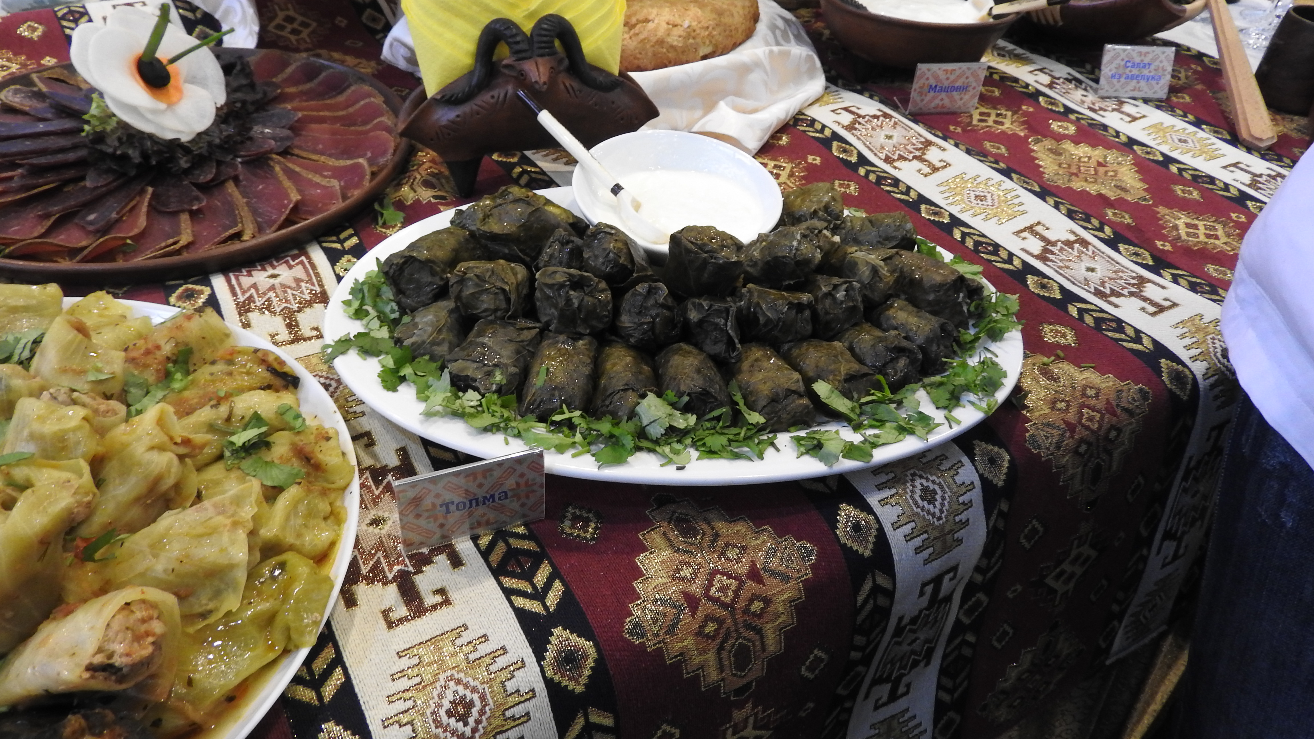 Выставка в Уфе "УФА-ЛАДЬЯ. АРТ.РЕМЕСЛА. СУВЕНИРЫ".